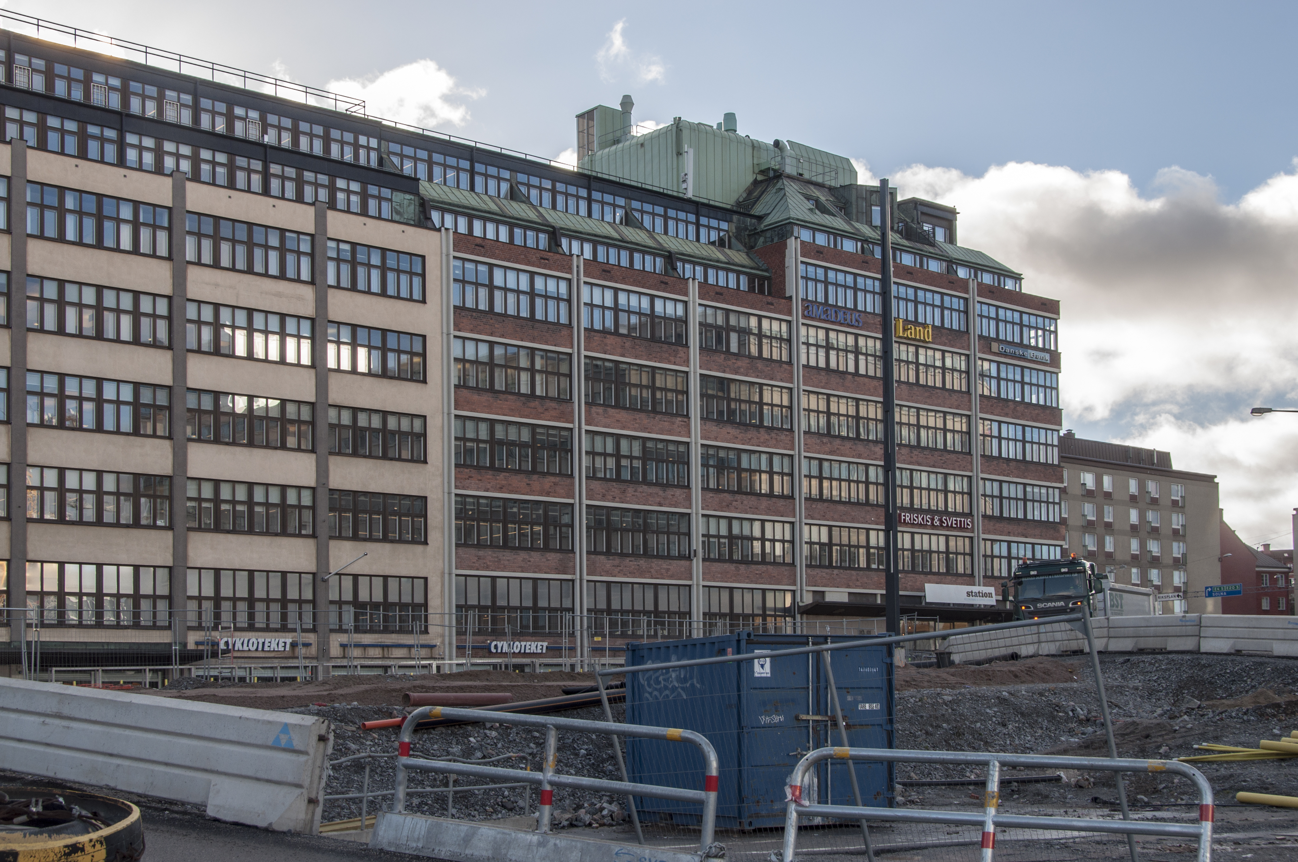 Blästern 6, Norra Stationsgatan 75-81, Tegeldel uppförd 1938, putsade delen 1946-48. Arkitekt Eskil Sundahl Bröderna Hedlund (Byggherre) Dahlberg (Byggmästare) Eskil Sundahl (Arkitekt)